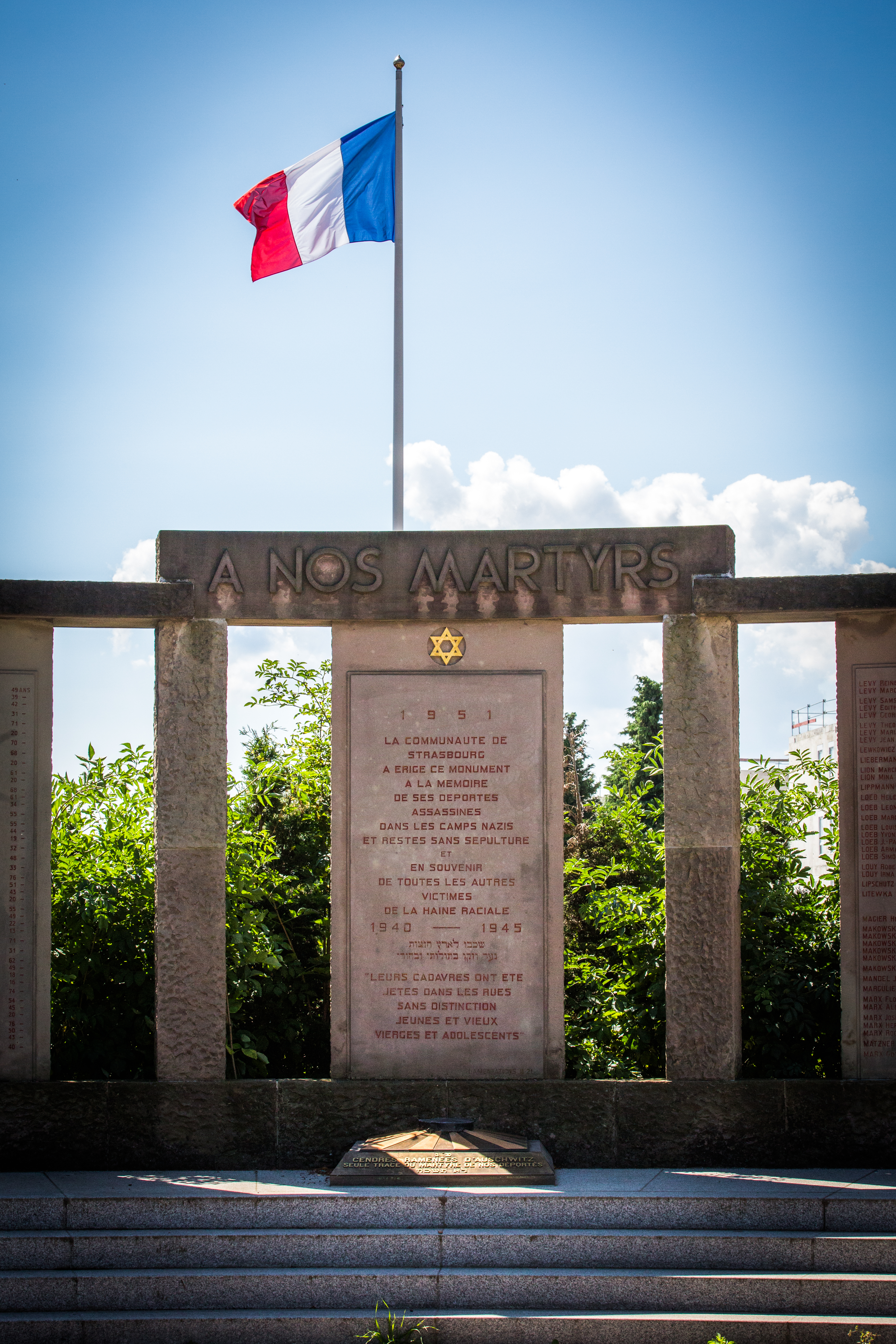 Monument à la mémoire des victimes de la Shoah